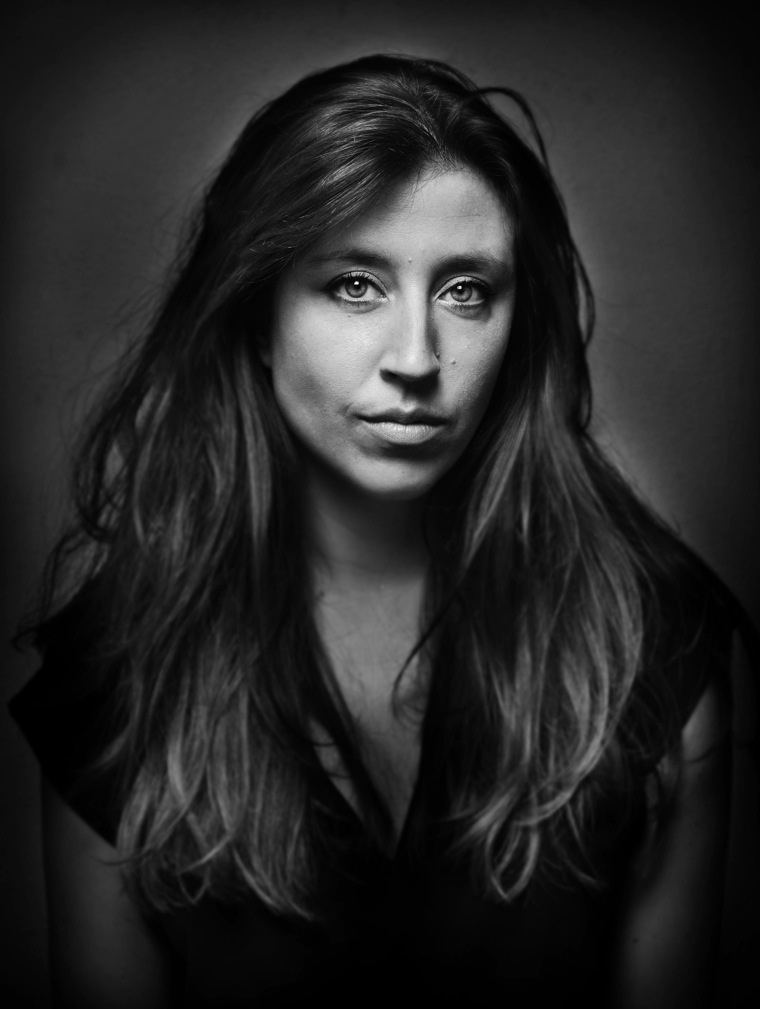 Debbie Crommelinck. Foto: Selina De Maeyer